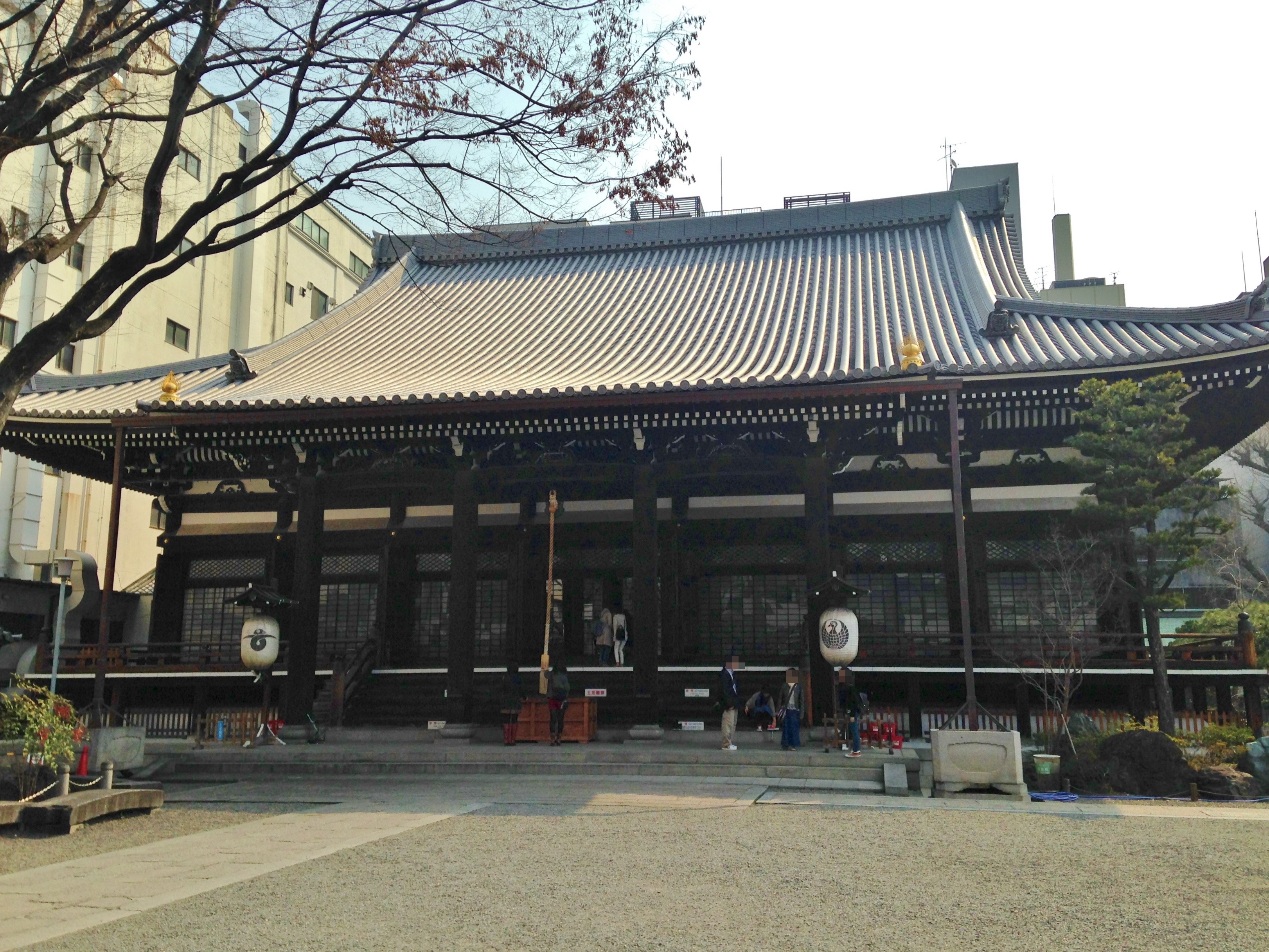 本能寺・本堂